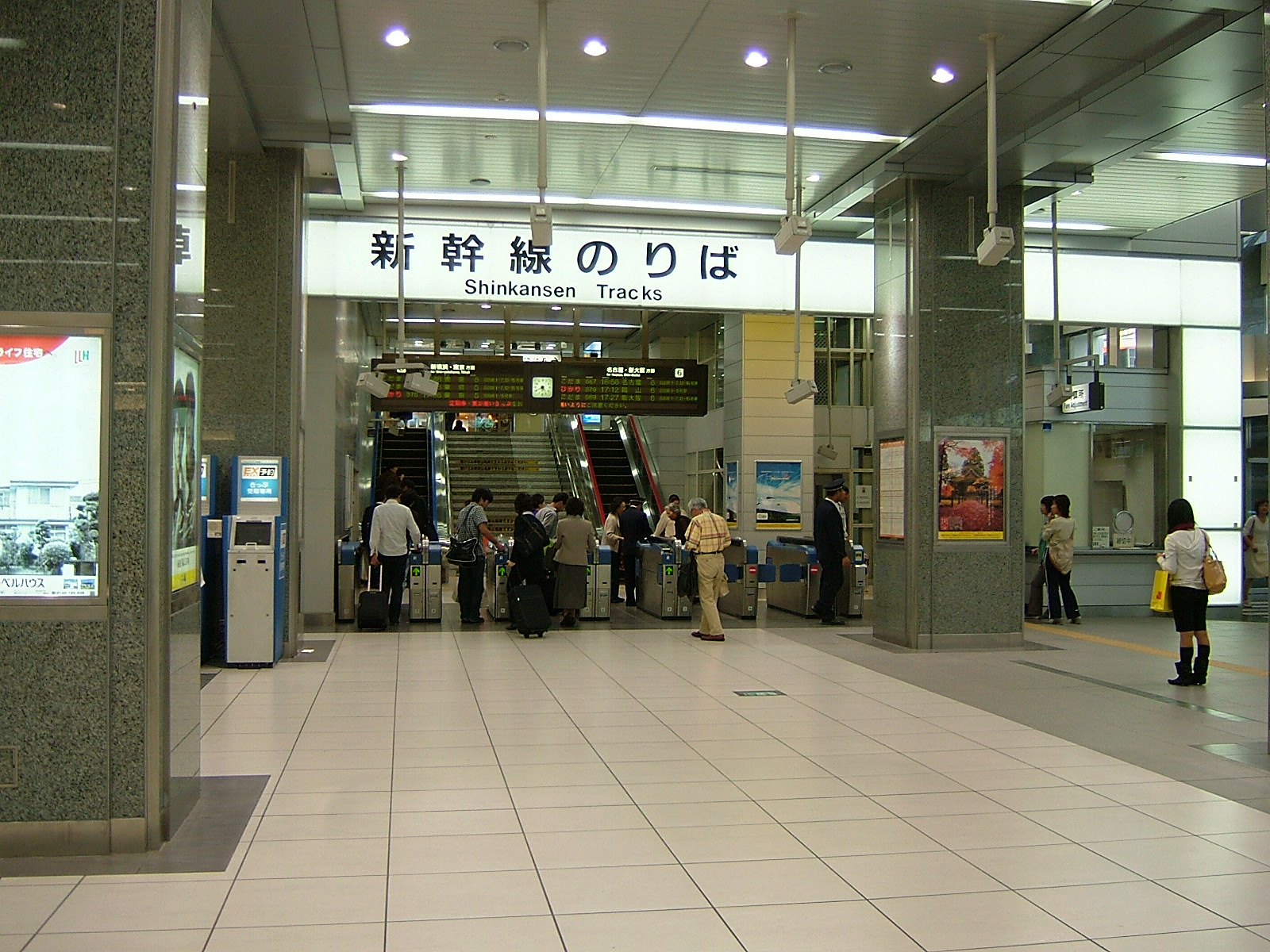 JR静岡駅新幹線改札口（コンコース）